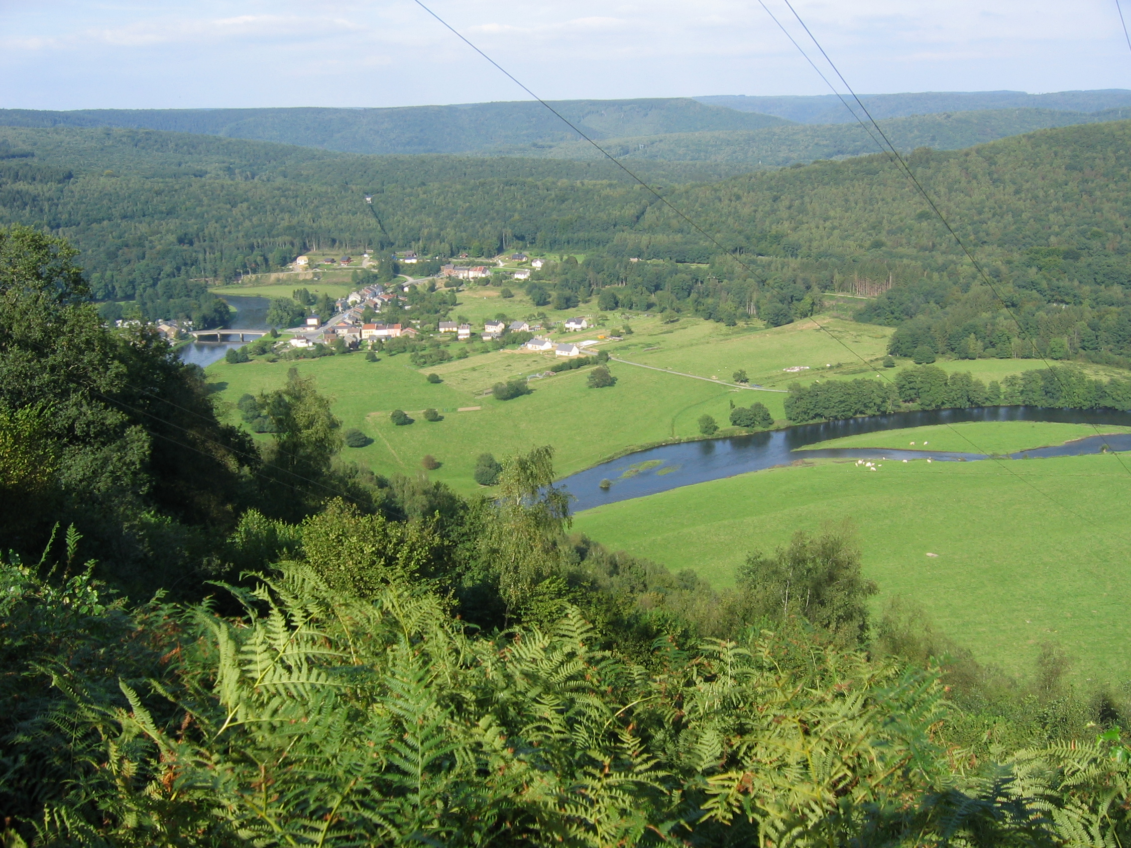 Vue de Tournavaux et de la Semoy à partir du lieu dit "Le Liry" (altitude:316m)